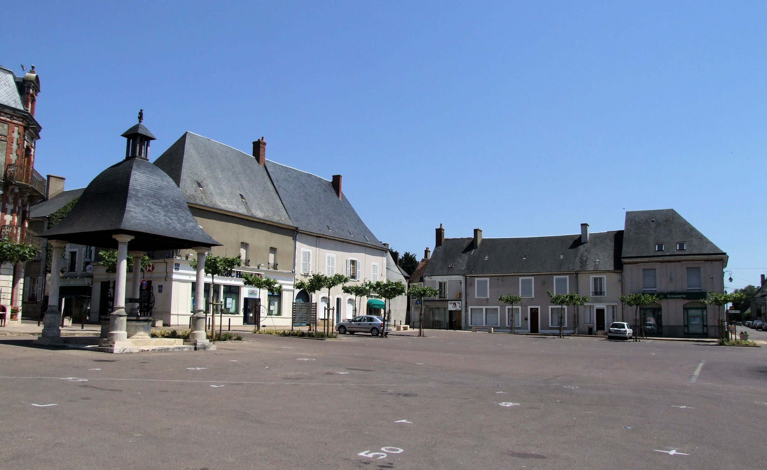 Henrichemont - Place centrale du village avec le puits reconstitué